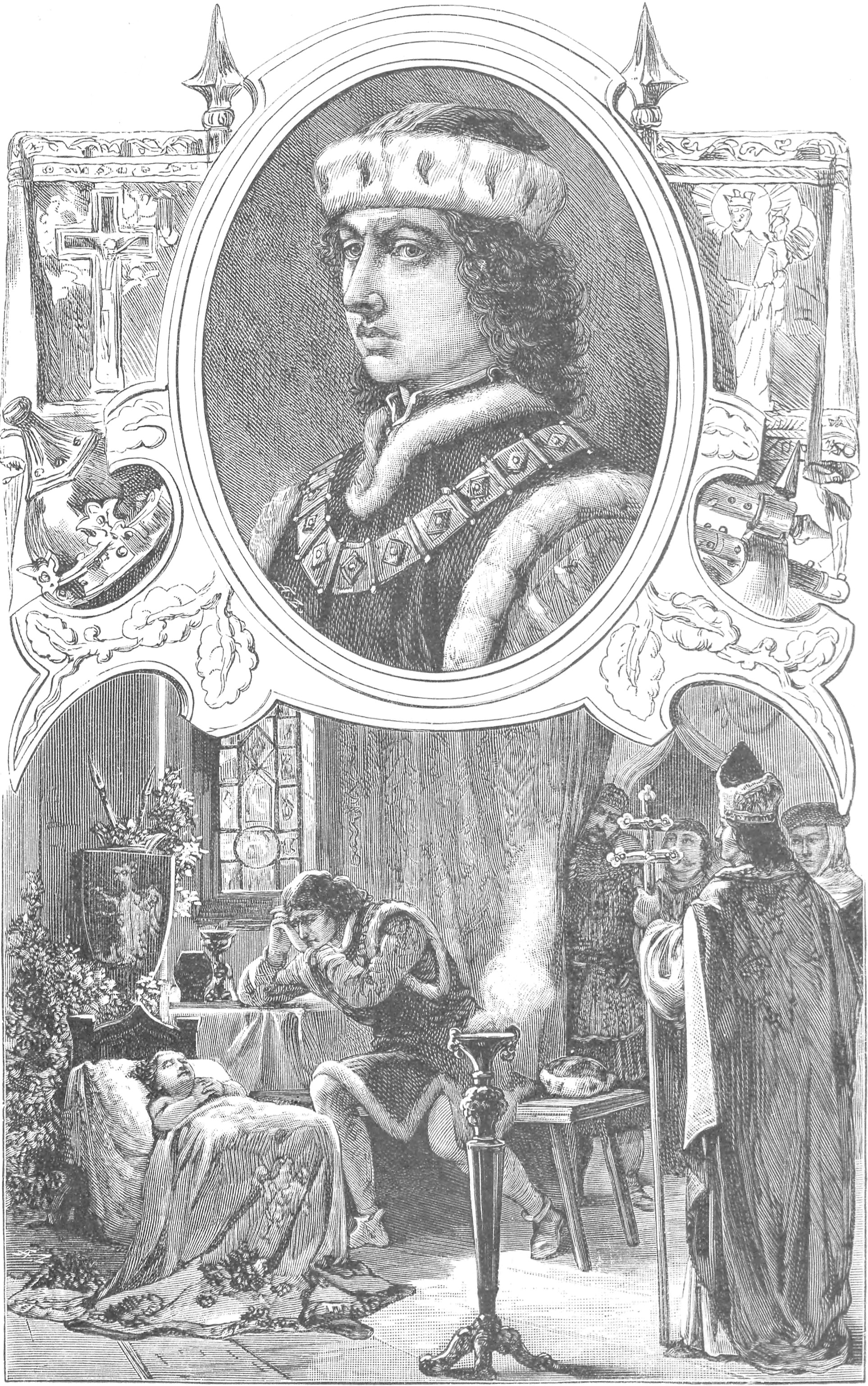 ilustracja z książki „Wizerunki książąt i królów polskich“